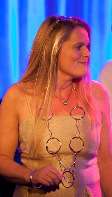 Christina Seest